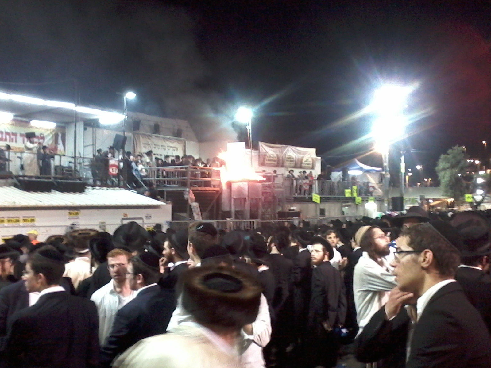 ההדלקה המרכזית של חסידות תולדות אהרון בקבר הרשב"י במירון. ל"ג בעומר ה'תשע"ח (2018)